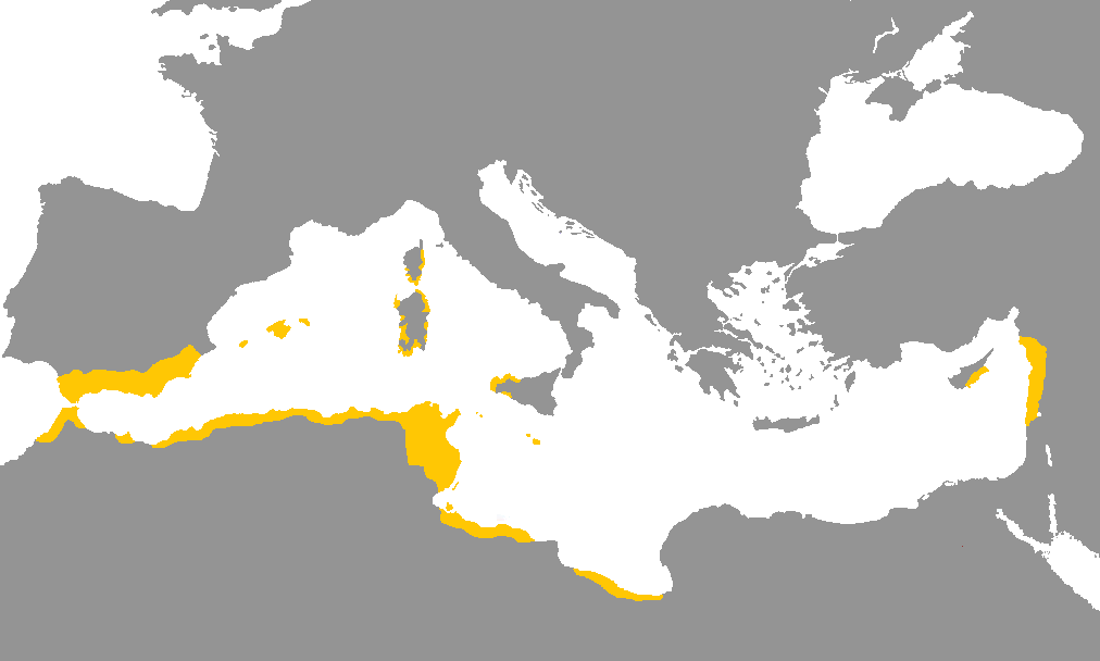 Idioma fenicio